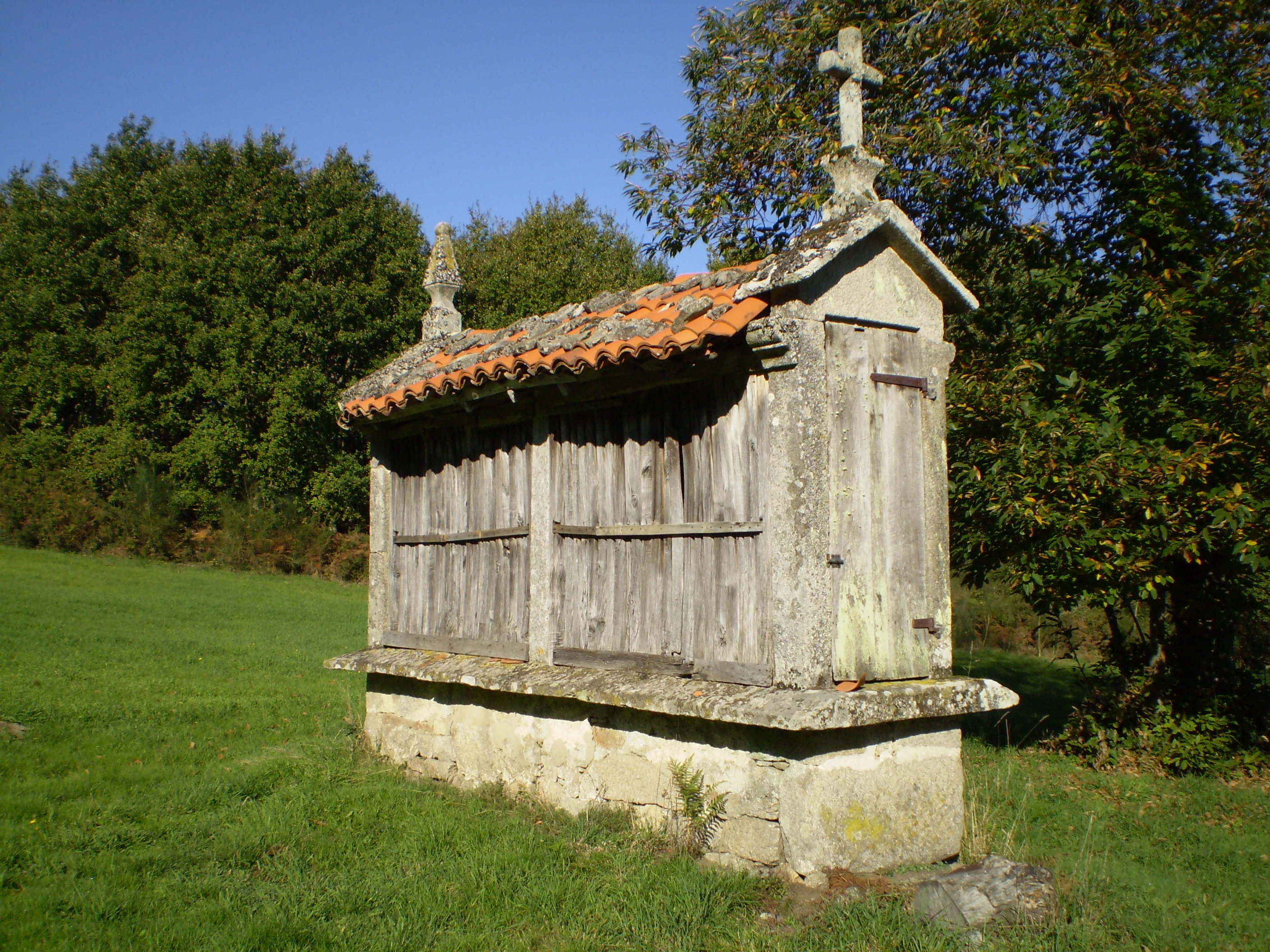 Hórreo en Río (Antas de Ulla)